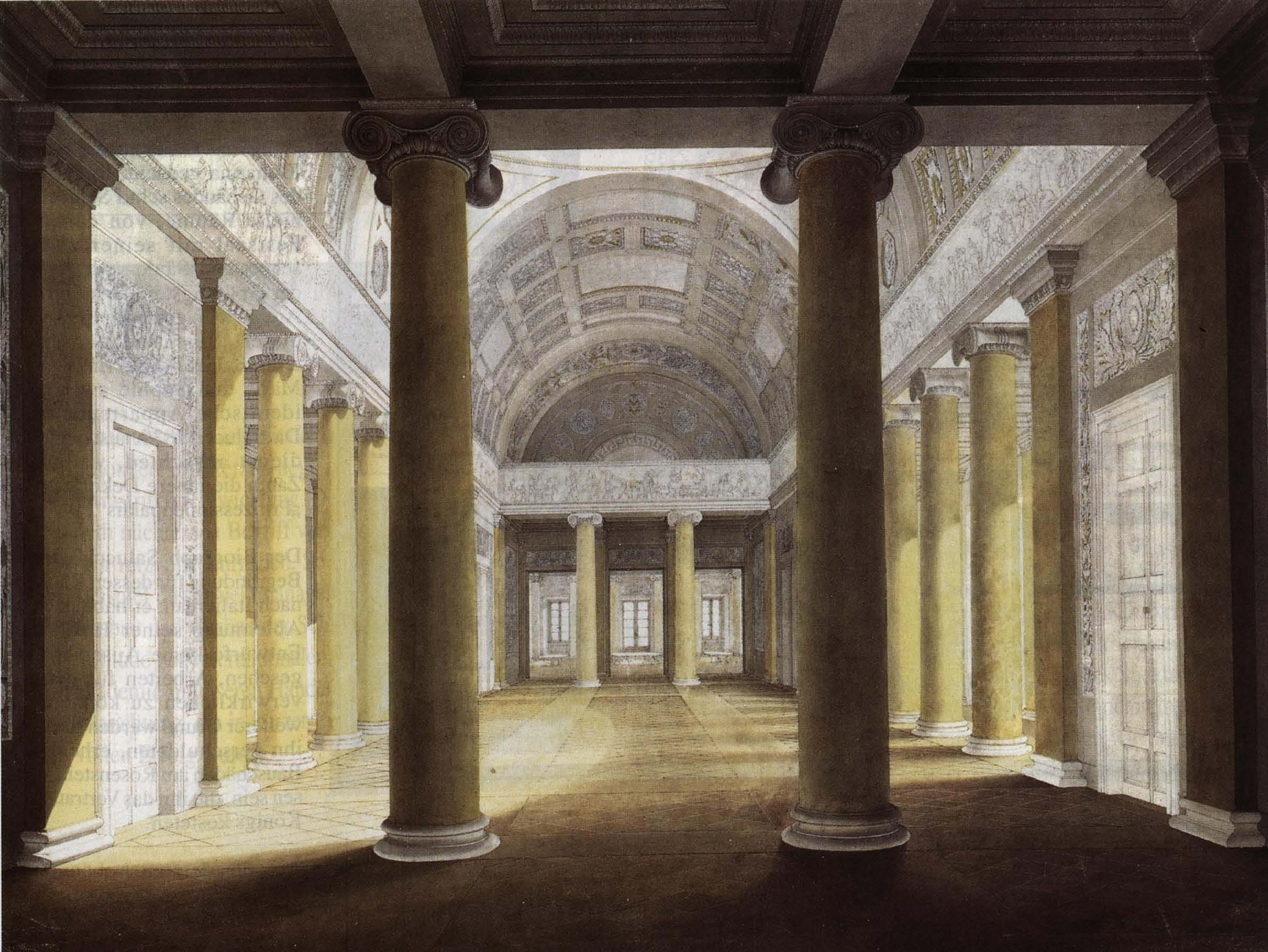 Festsaal, Stuttgart, Schloss Rosenstein. Aquarellierte Federzeichnung von Giovanni Salucci, um 1821, Universitätsbibliothek Stuttgart, Karten- und Plansammlung, Inventarnummer Salu026.